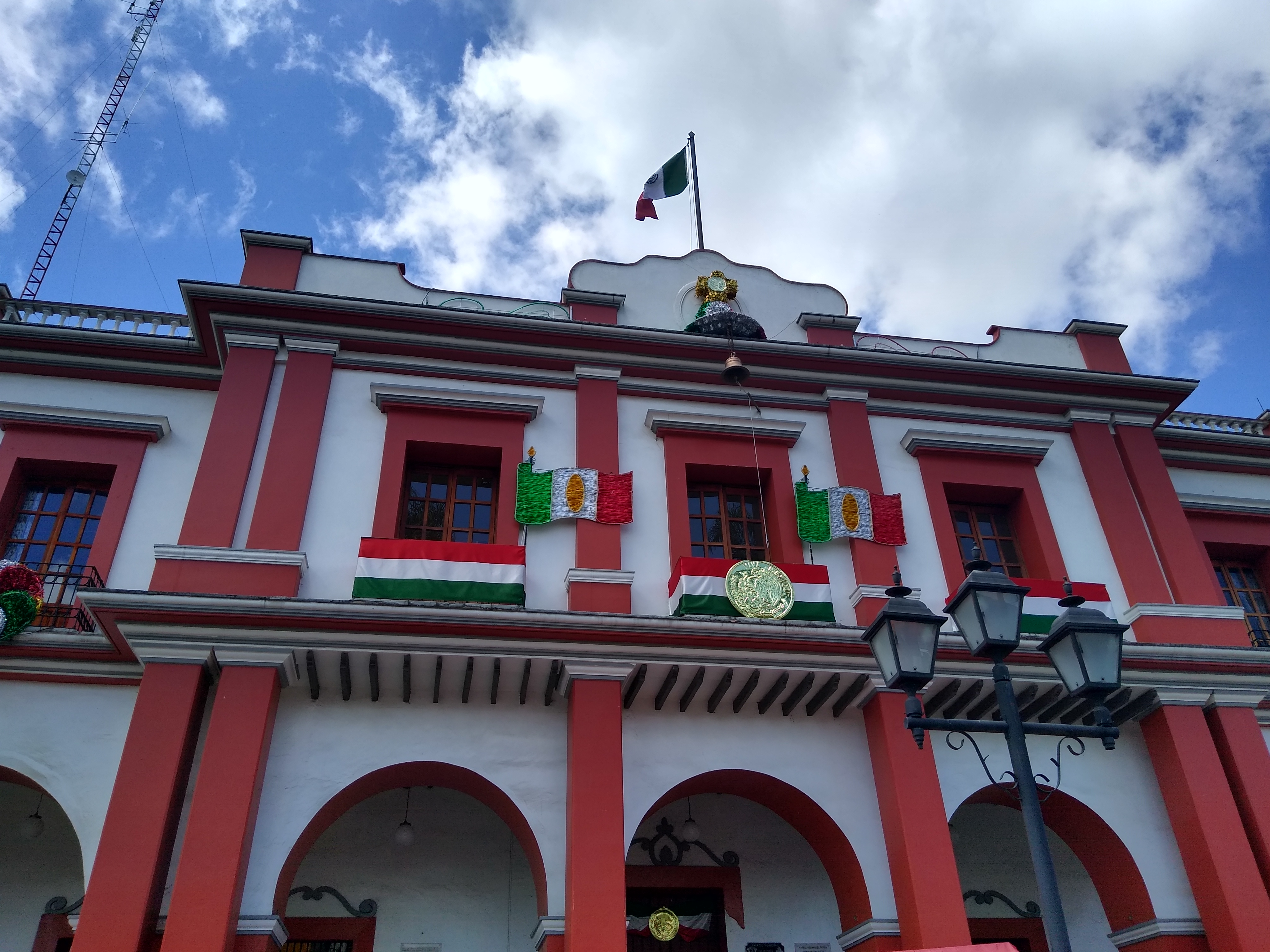 Presidencia municipal de Coscomatepec, Veracruz